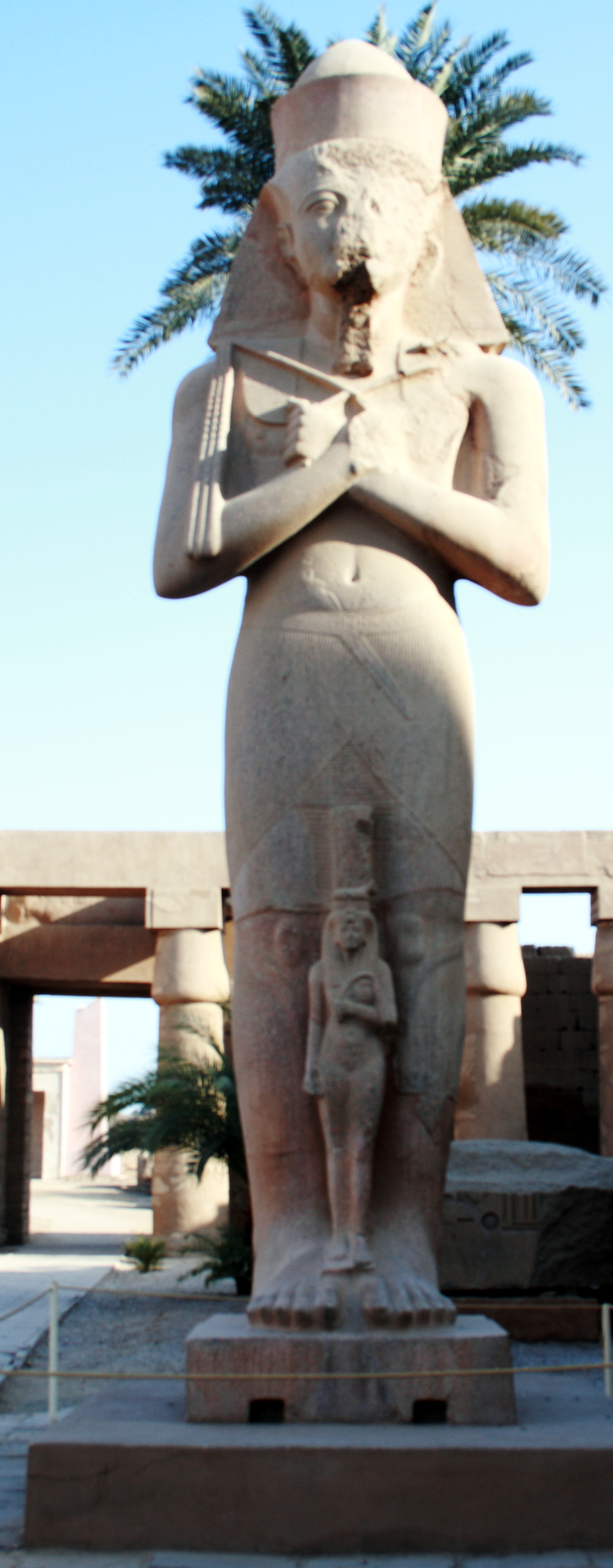 Karnak_temple of Amun-Ra: Pinudjem I. mit seiner kleinen Tochter zwischen den Knien.